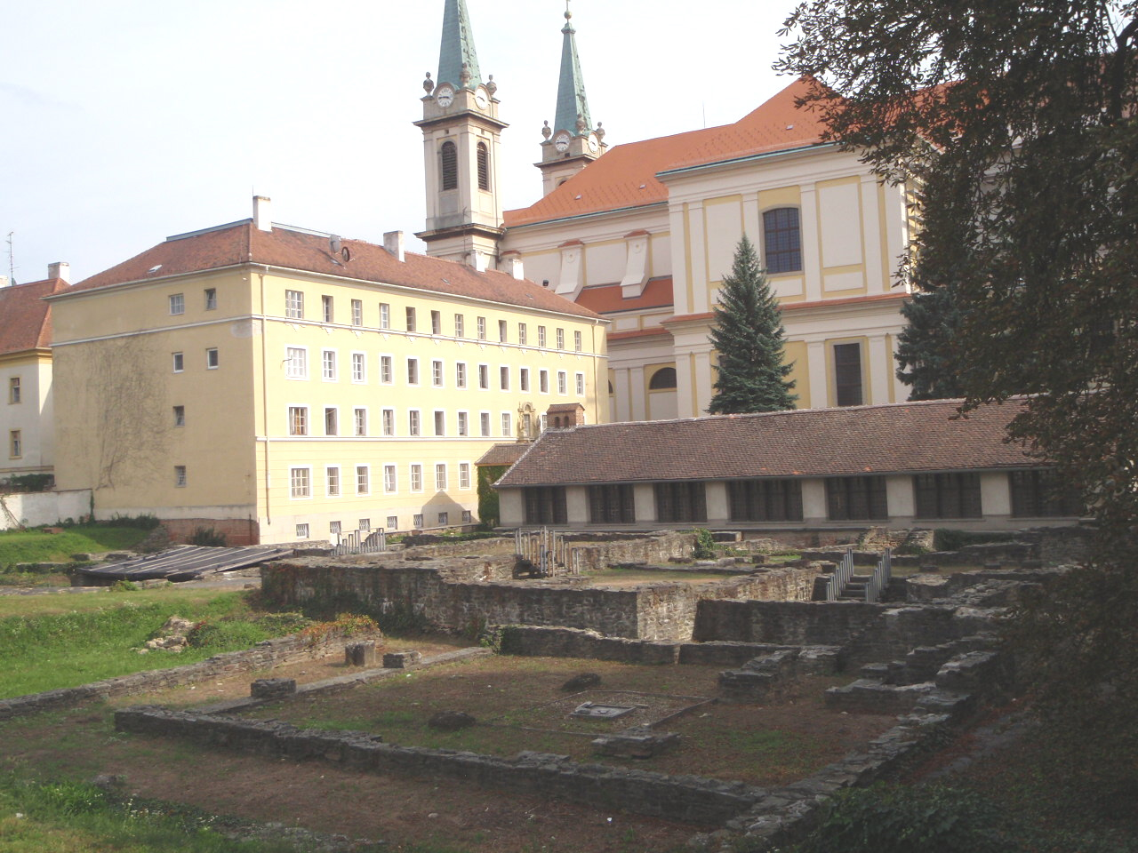 Járdányi Paulovics István Romkert, - Cím: Szombathely, Mindszenty József tér a Székesegyház mögött.